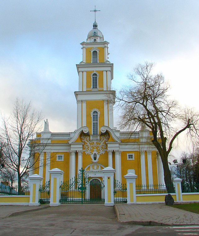 Panevezio Kristaus Karaliaus katedra